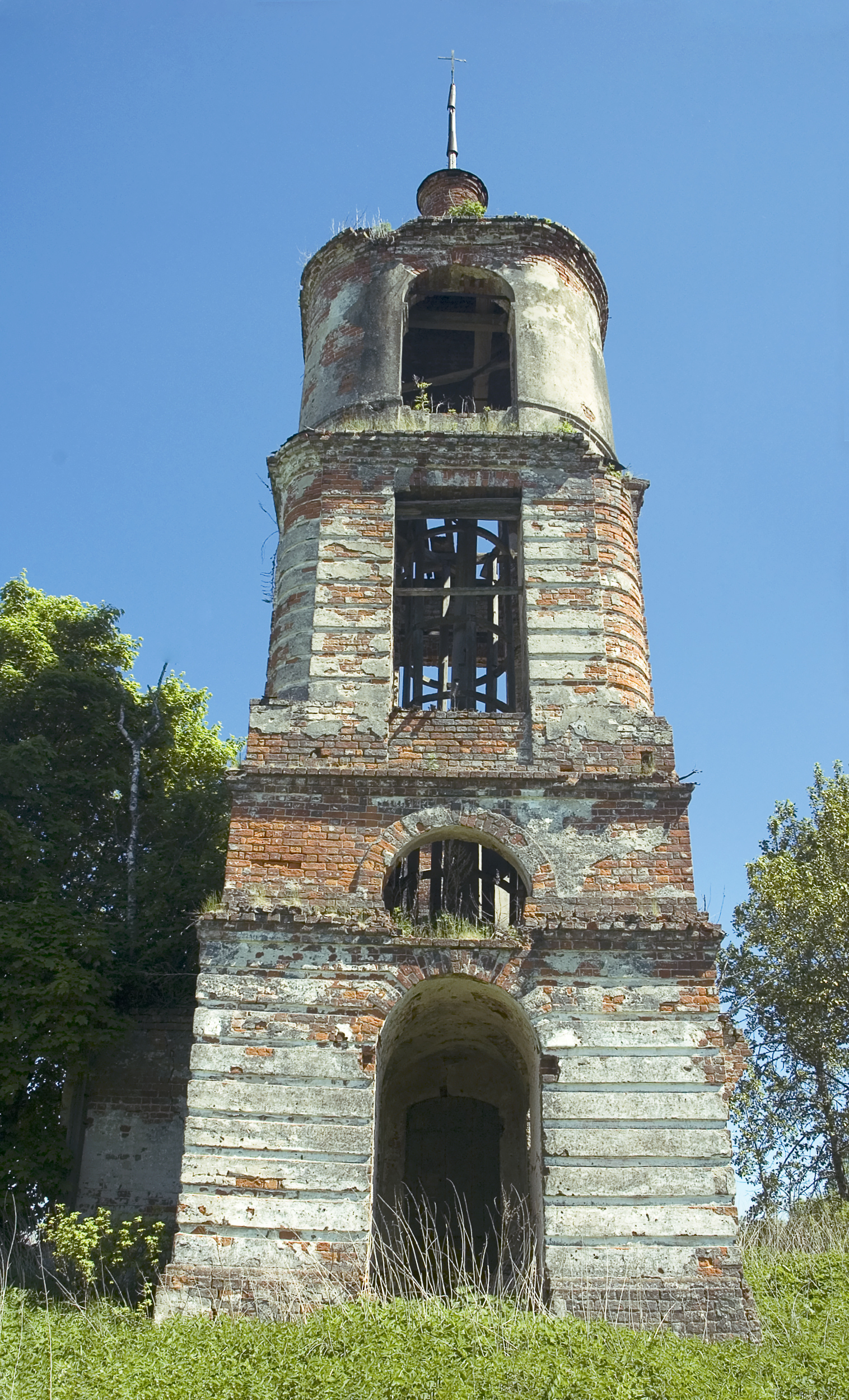 Церковь Во имя Николая Чудотворца в селе Лучинское. Переславский район. Ярославская область